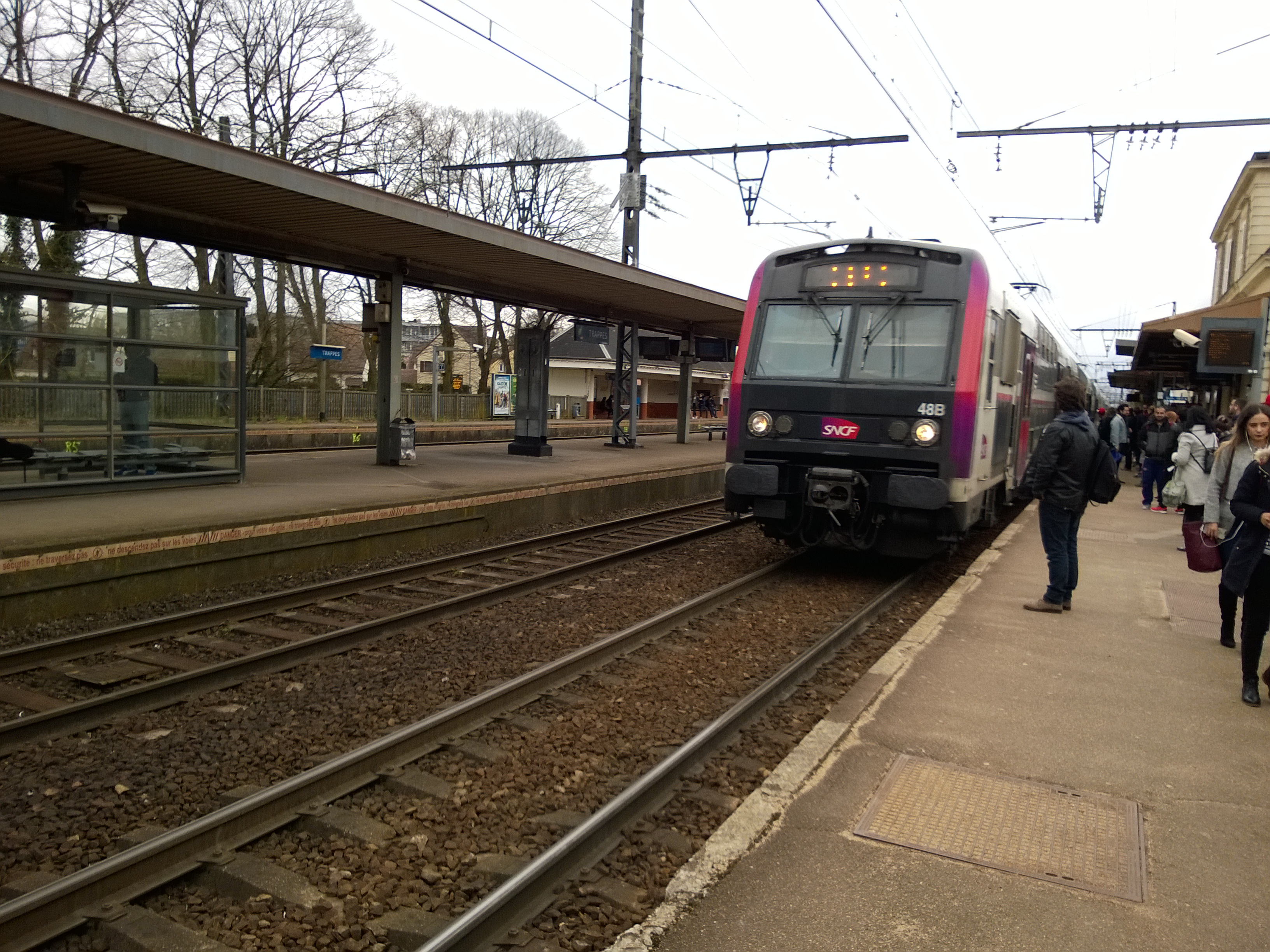 Une unité multiple de Z 8800 en gare de Trappes, assurant une mission DEFI.